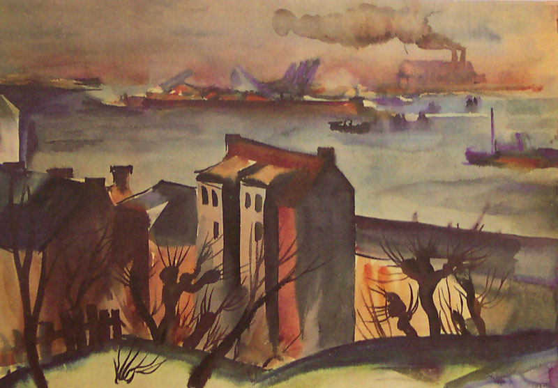 Elfriede Lohse-Wächtler: Blick über den Hafen (um 1929); Aquarell 51,0 x 72,8 cm. Nachlass Elfriede Lohse-Wächtler, Privatbesitz Hamburg